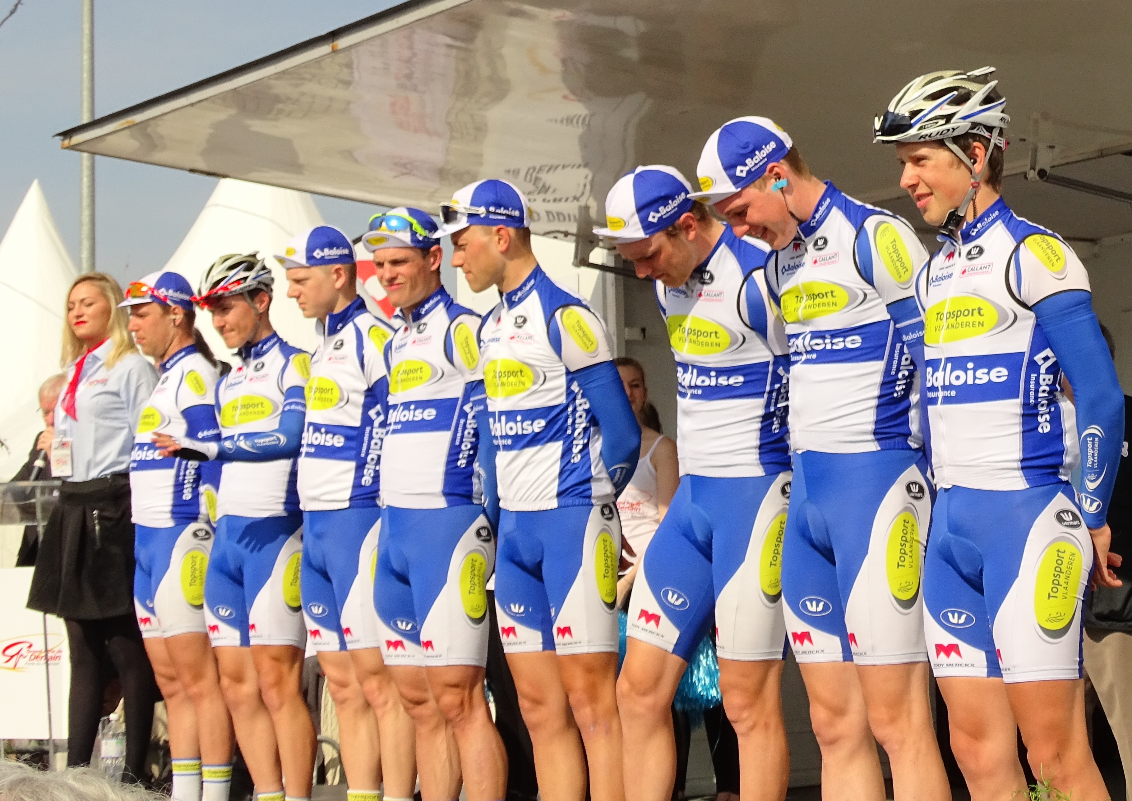 Reportage réalisé le jeudi 14 avril à l'occasion du départ et de l'arrivée du Grand Prix de Denain 2016 à Denain, Nord, Nord-Pas-de-Calais-Picardie, France.